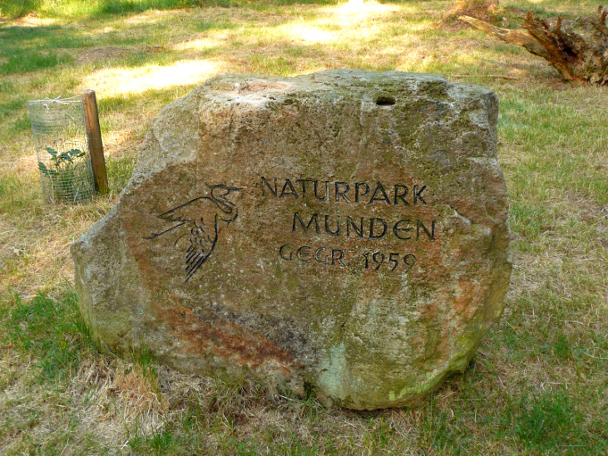 Stein Naturpark Münden